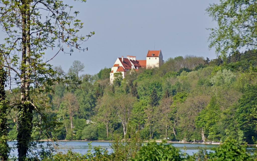 Schloss Seefeld liegt in der Gemeinde Seefeld am Pilsensee im Starnberger Fünf-Seen-Land und befindet sich in Privatbesitz von Hans Caspar Graf zu Törring-Jettenbach. Im Schloss befindet sich ein Kino, die Schlossgaststätte mit Bräustüberl sowie verschiedene kleine Läden und Ateliers. Im Schloss finden regelmäßig kulturelle Veranstaltungen statt (Kabaret, Literatur, Musik, Lesungen).